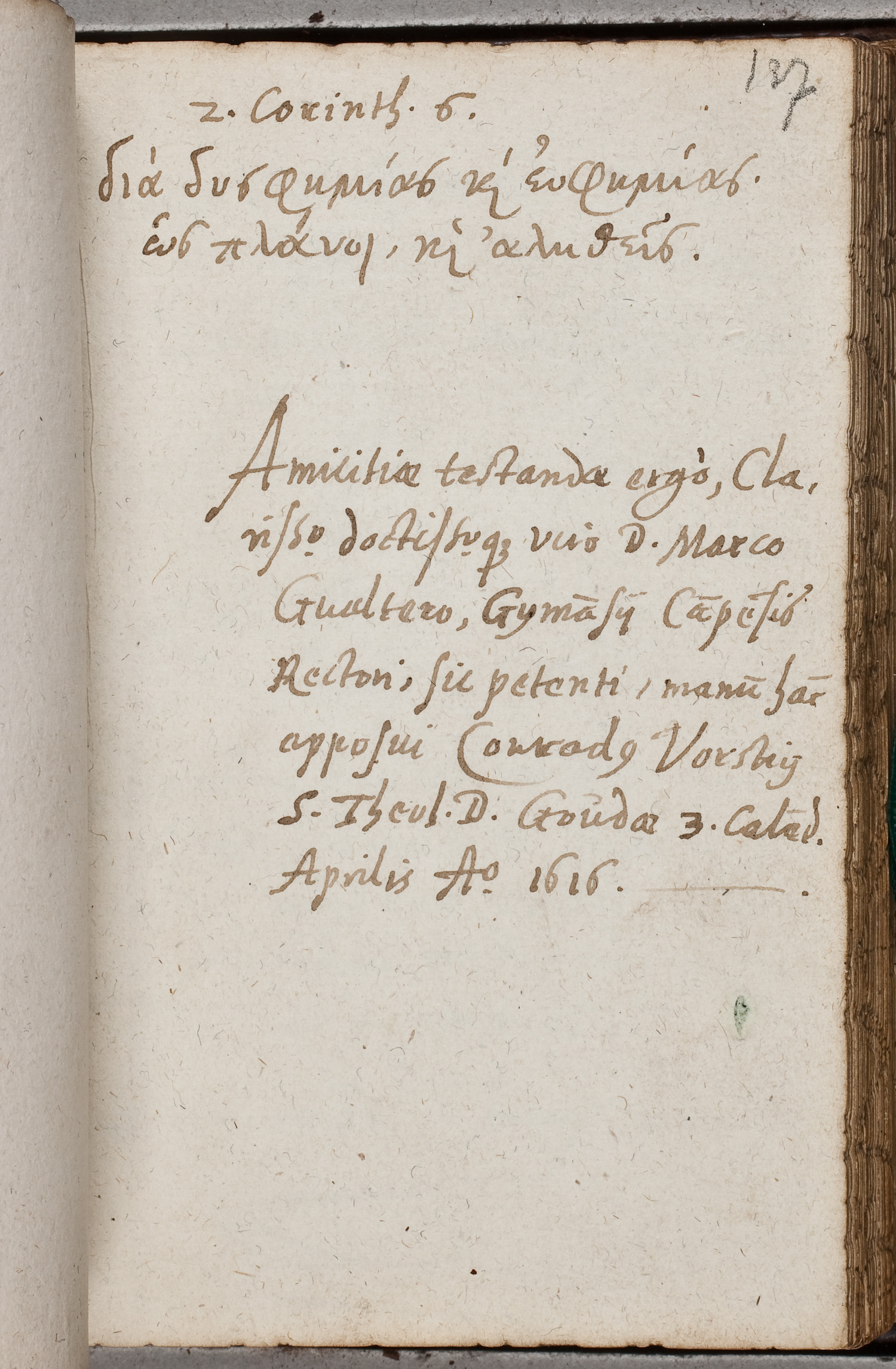 Eintrag Conrad Vorstius/Konrad von der Vorst (1569-1622) im Stammbuch Wolfgang Marcus Gualtherus.